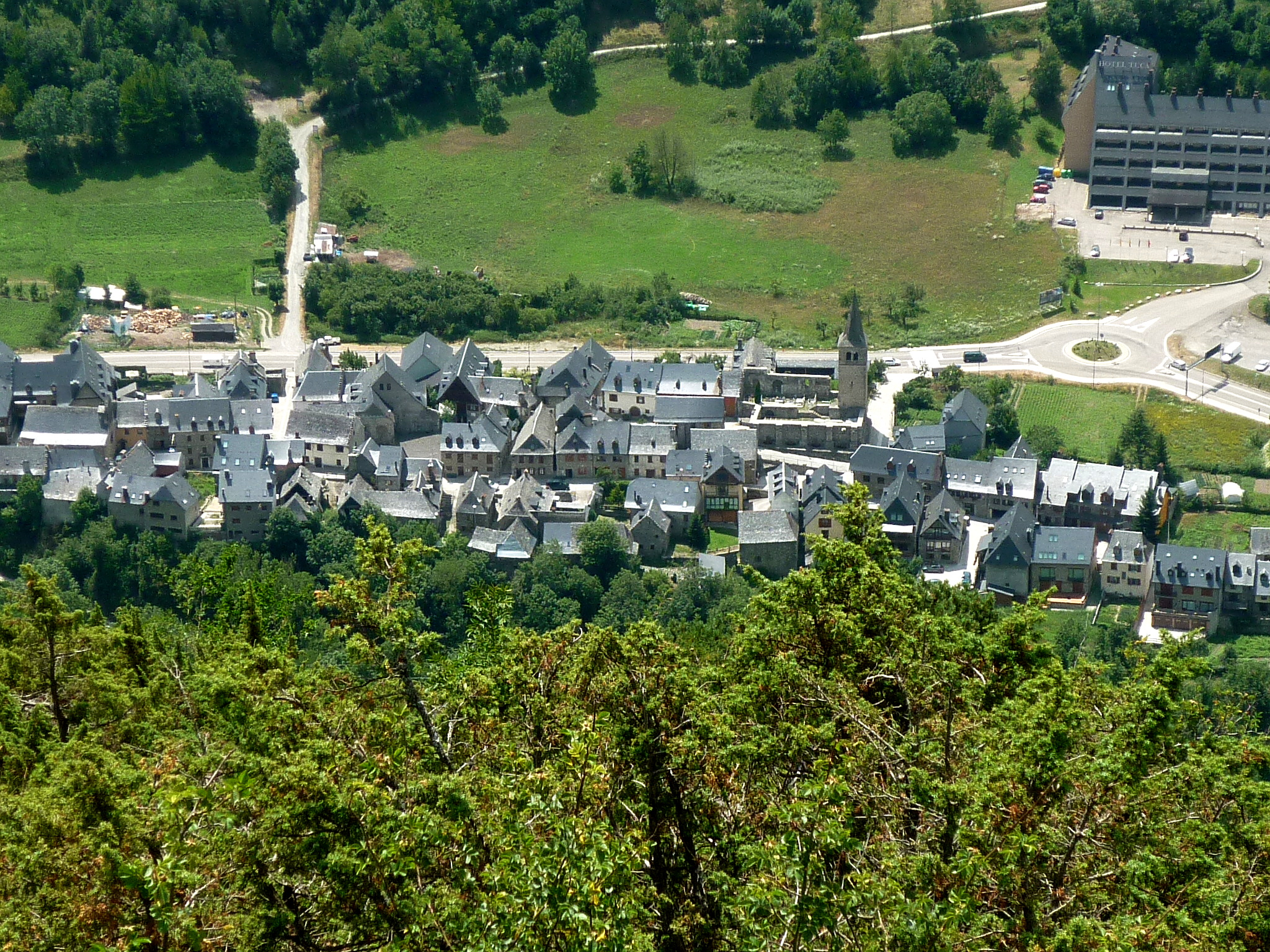 Betren (Vielha e Mijaran), des del mirador de Salient